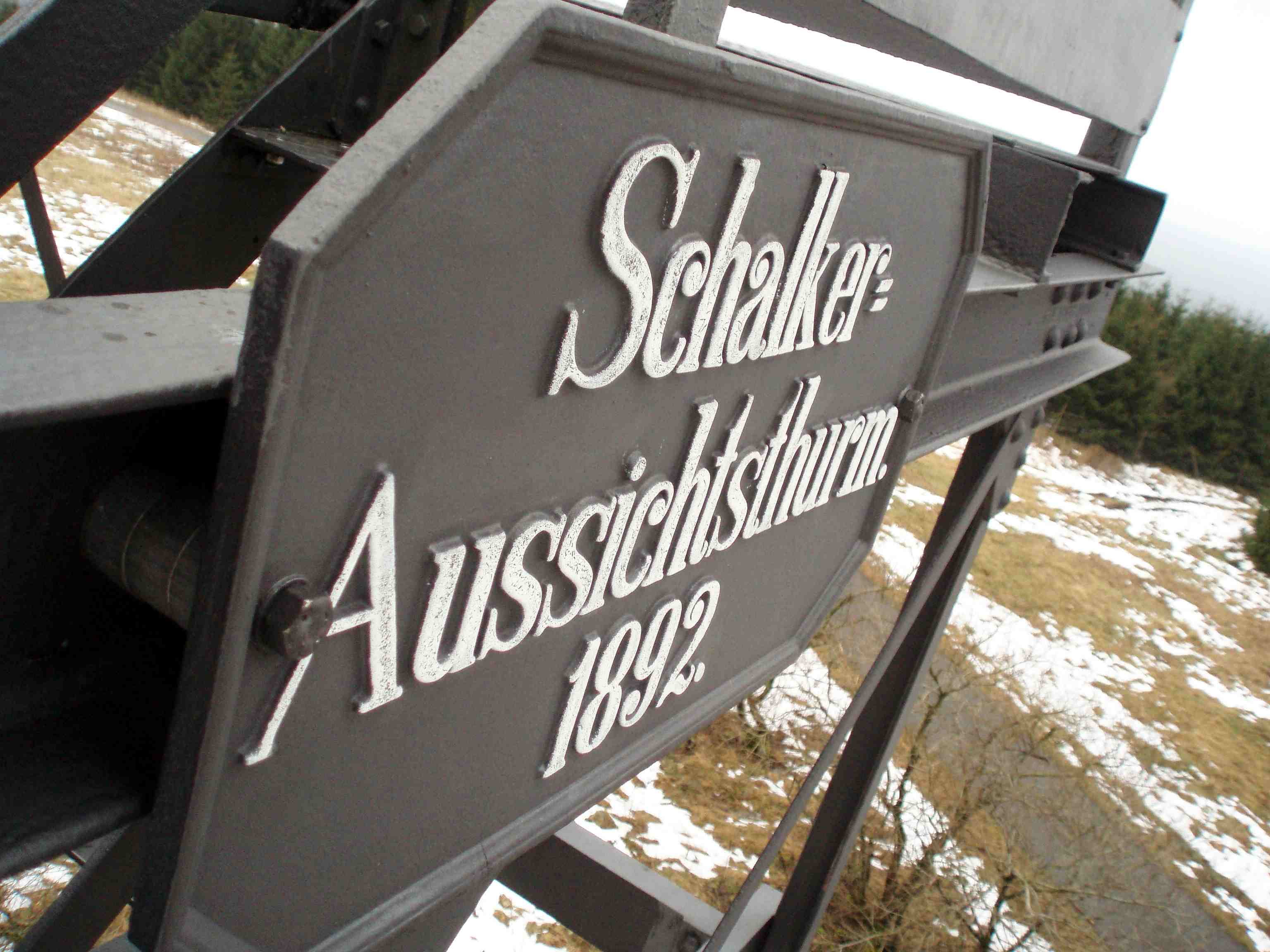 Schalker Aussichtsthurm 1892